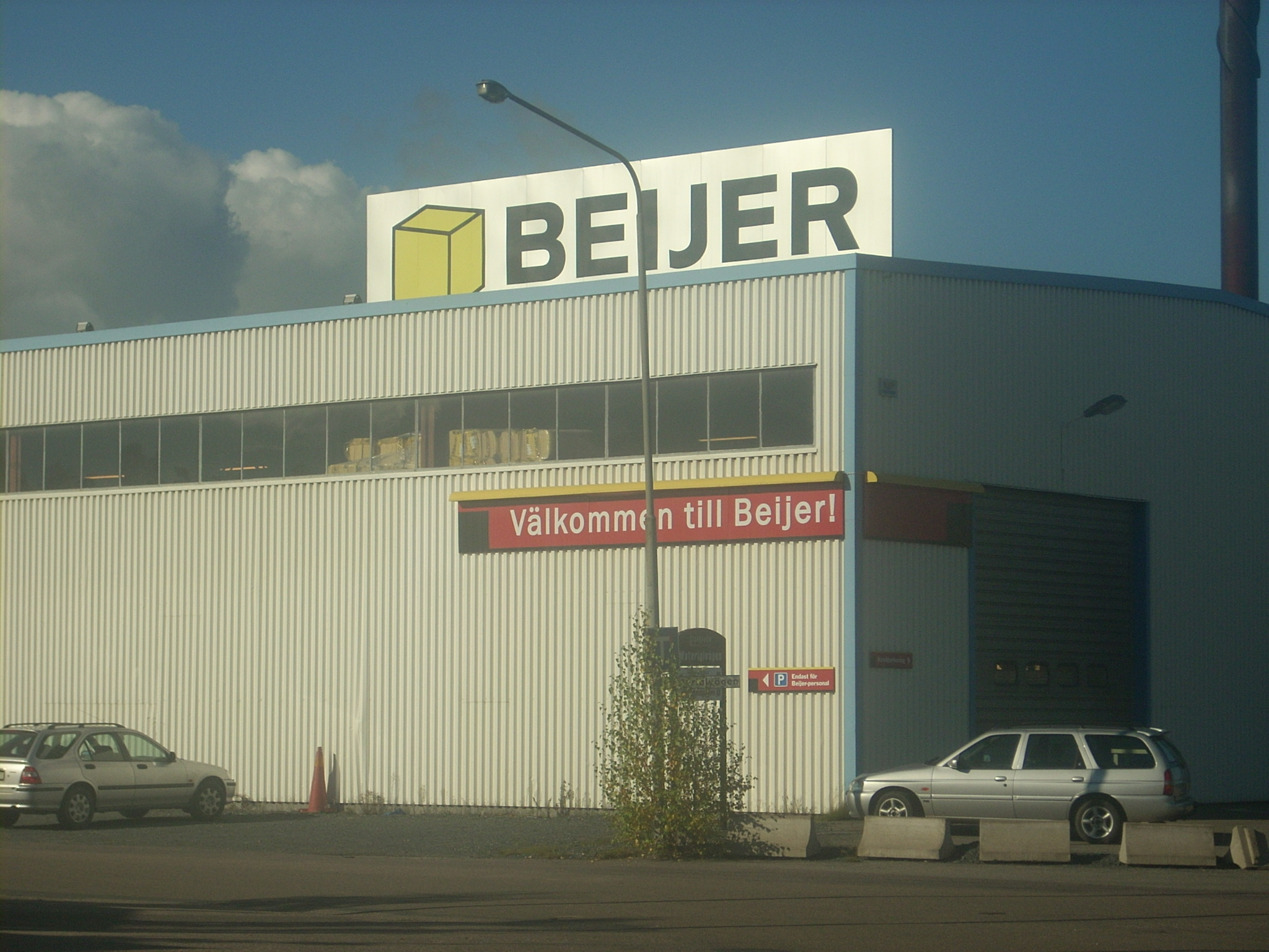 Beijer Byggmaterial i Jönköping